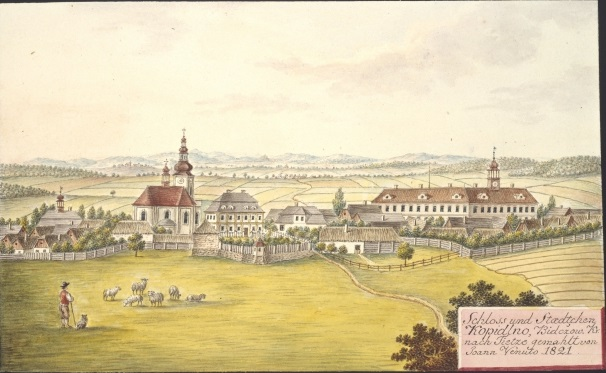 Kopidlno. Schloss und Stadtchen Kopidlno, Bidczow. Kr. nach Tietze gemahlt von Joann Venuto 1821